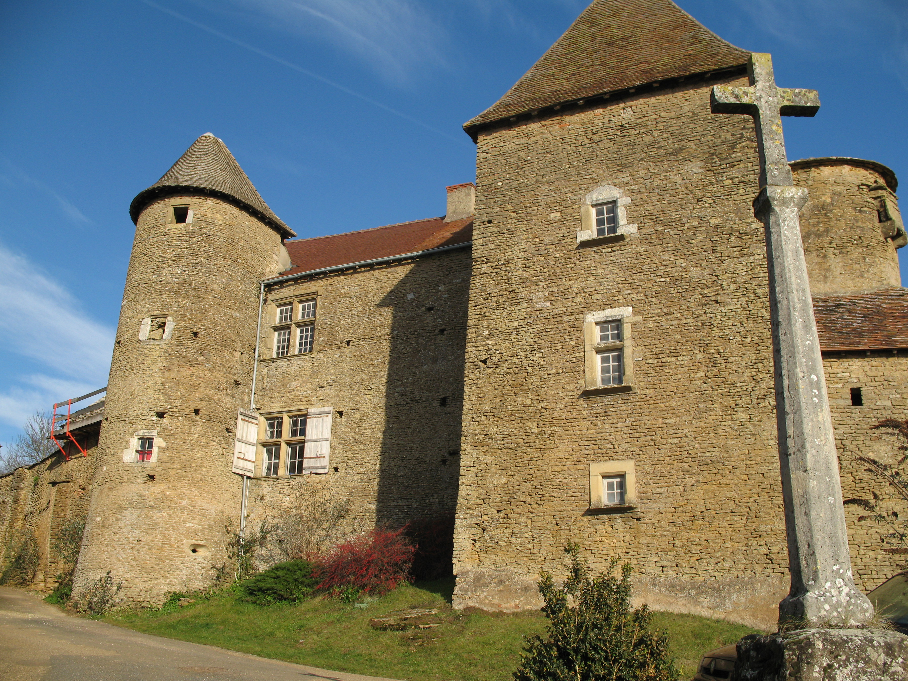 château de Bissy-sur-Fley (Saône-et-Loire)